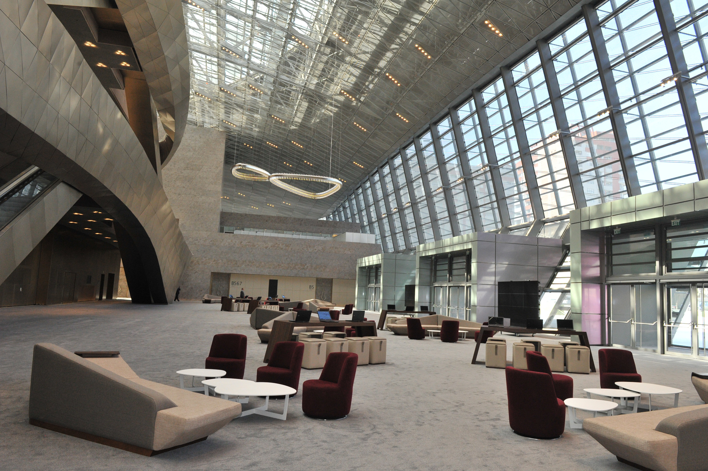 Baku Congress Center